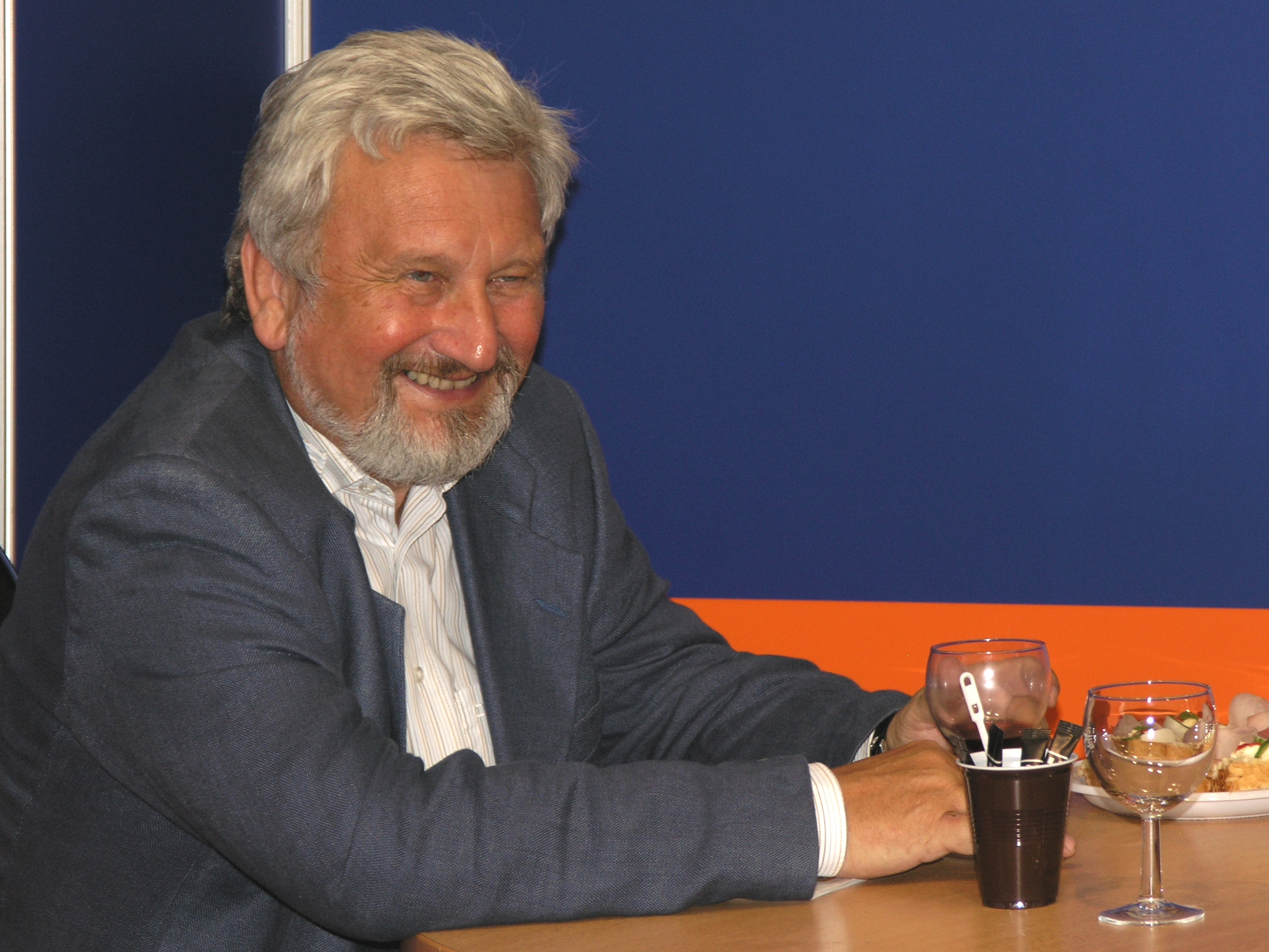 Praha, Svět knihy 2009 - Jan Cimický